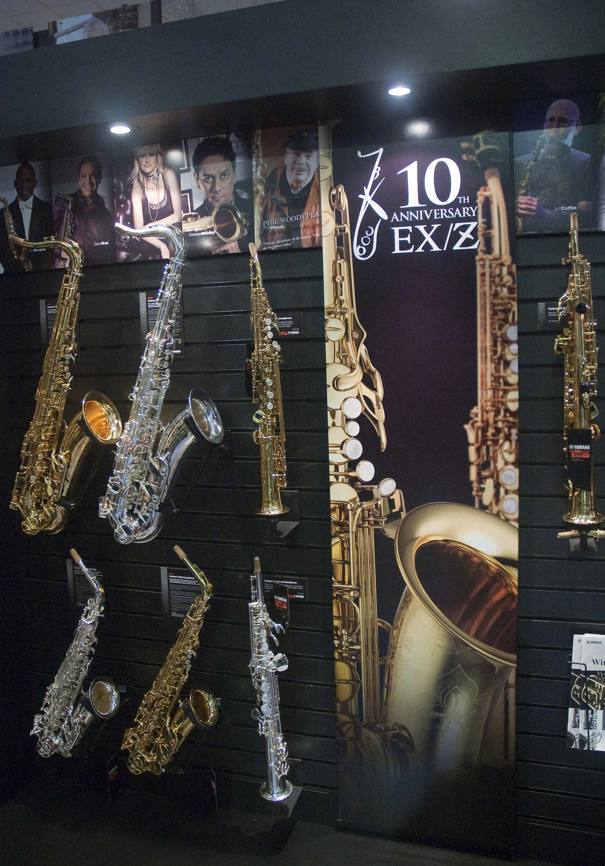 Yamaha Custom Z Tenor, Alto, Soprano, and Custom EX Soprano Saxophones, NAMM 2013